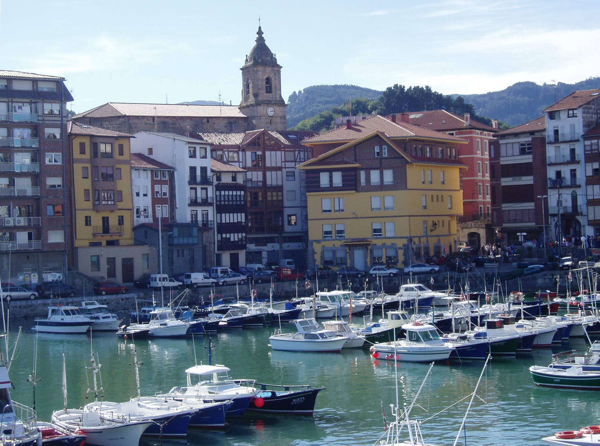 P1010011: Bermeo Port